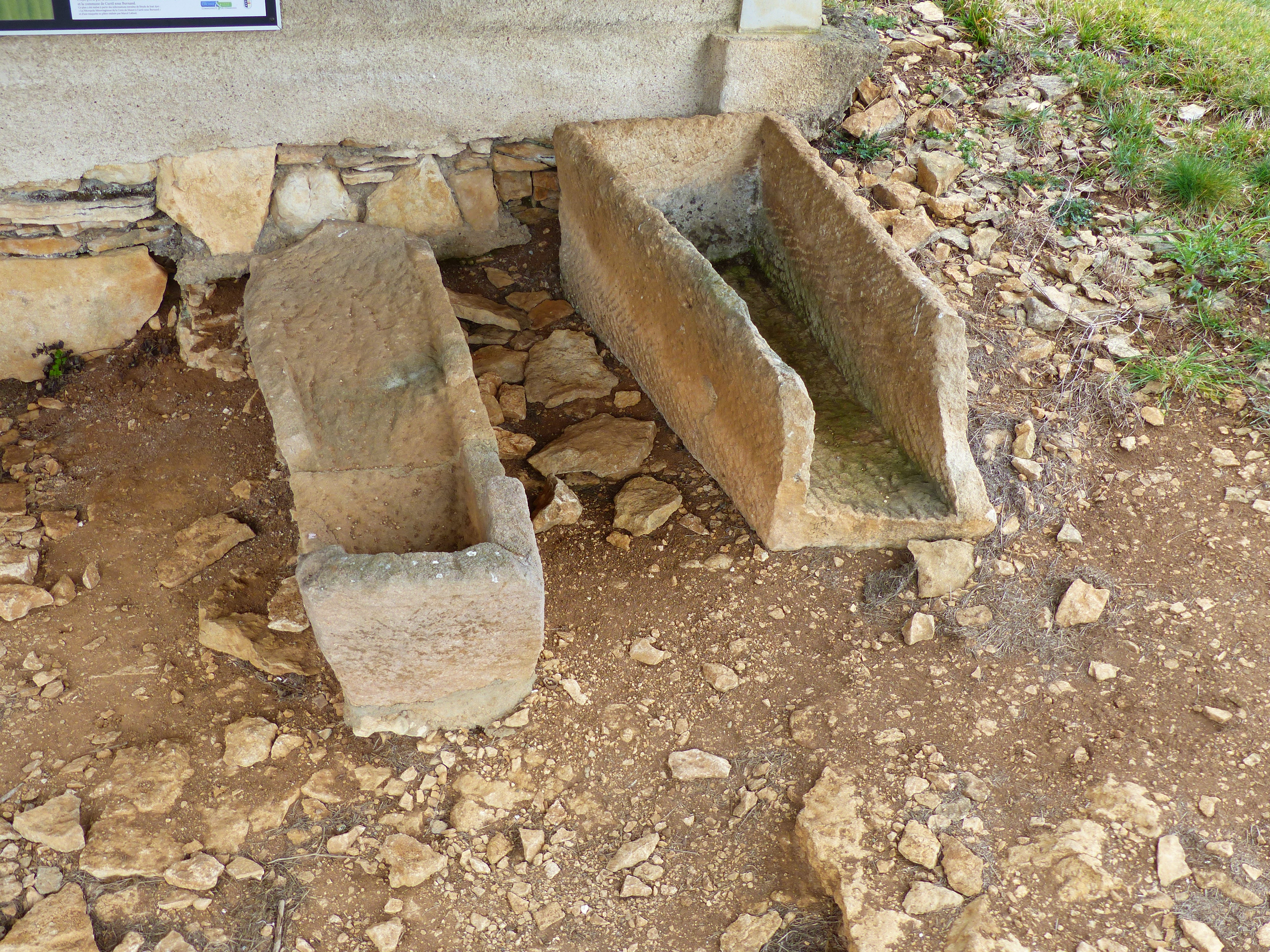 Nécropole Mérovingienne de la Croix de Munot